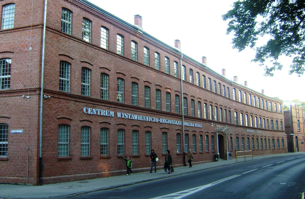 Centrum Wystawienniczo-Regionalne Dolnej Wisły w Tczewie